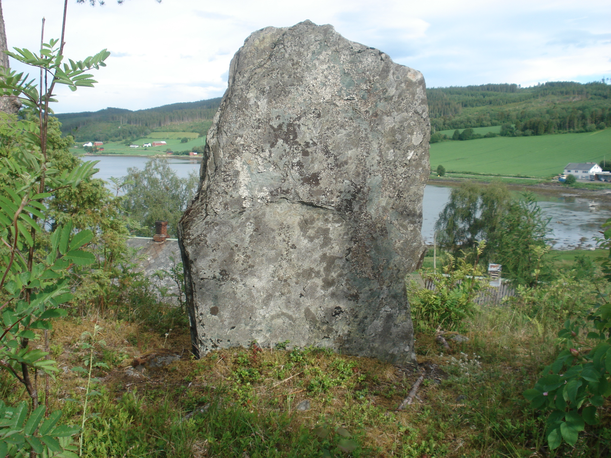 Bauta reist i 1909 på ei gravrøys.